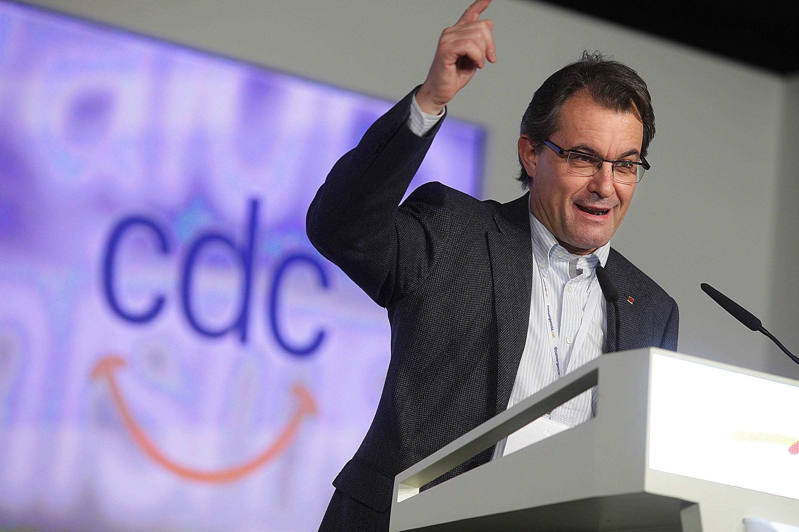 24.03.2012, Reus 16è Congrés de Convergència Democràtica de Catalunya a Reus. Informe de Gestió de la Direcció Nacional. Artur Mas. Foto: CDC/Jordi Play